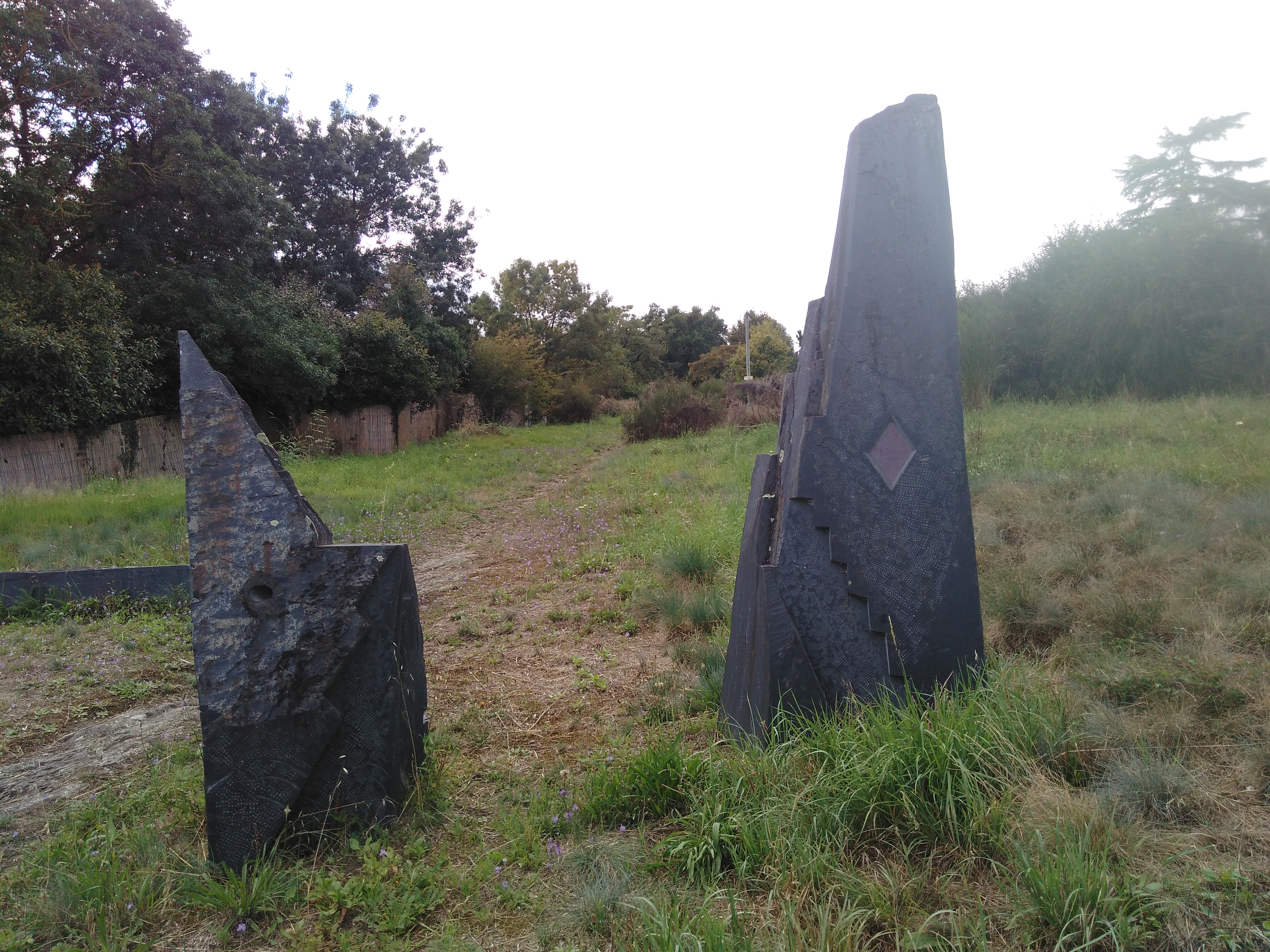 A gauche, la stèle en hommage à la Résistance française, à droite la stèle en hommage aux troupes américaines "Red Diamond"